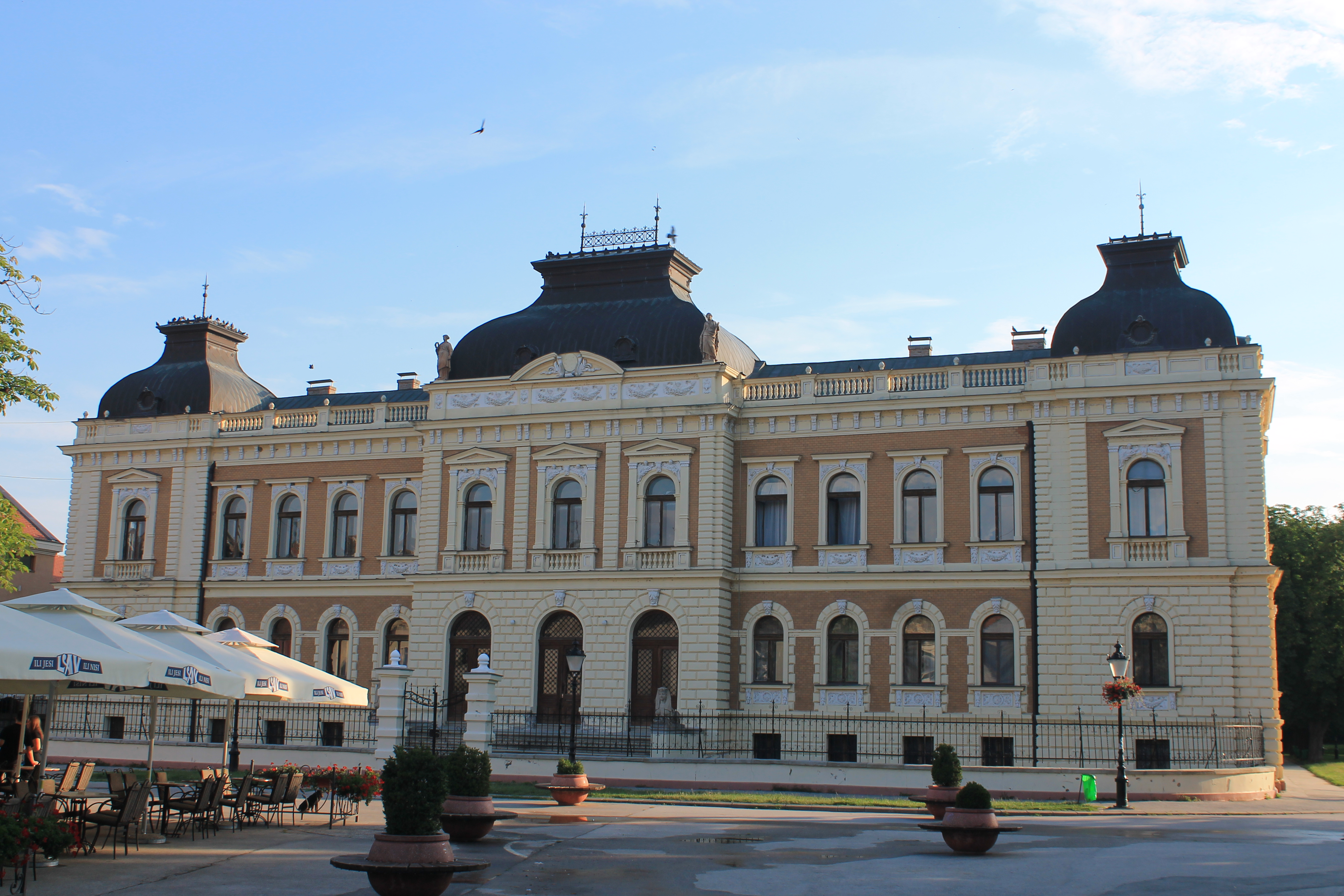 Pravoslavna bogoslovija u Sremskim Karlovcima